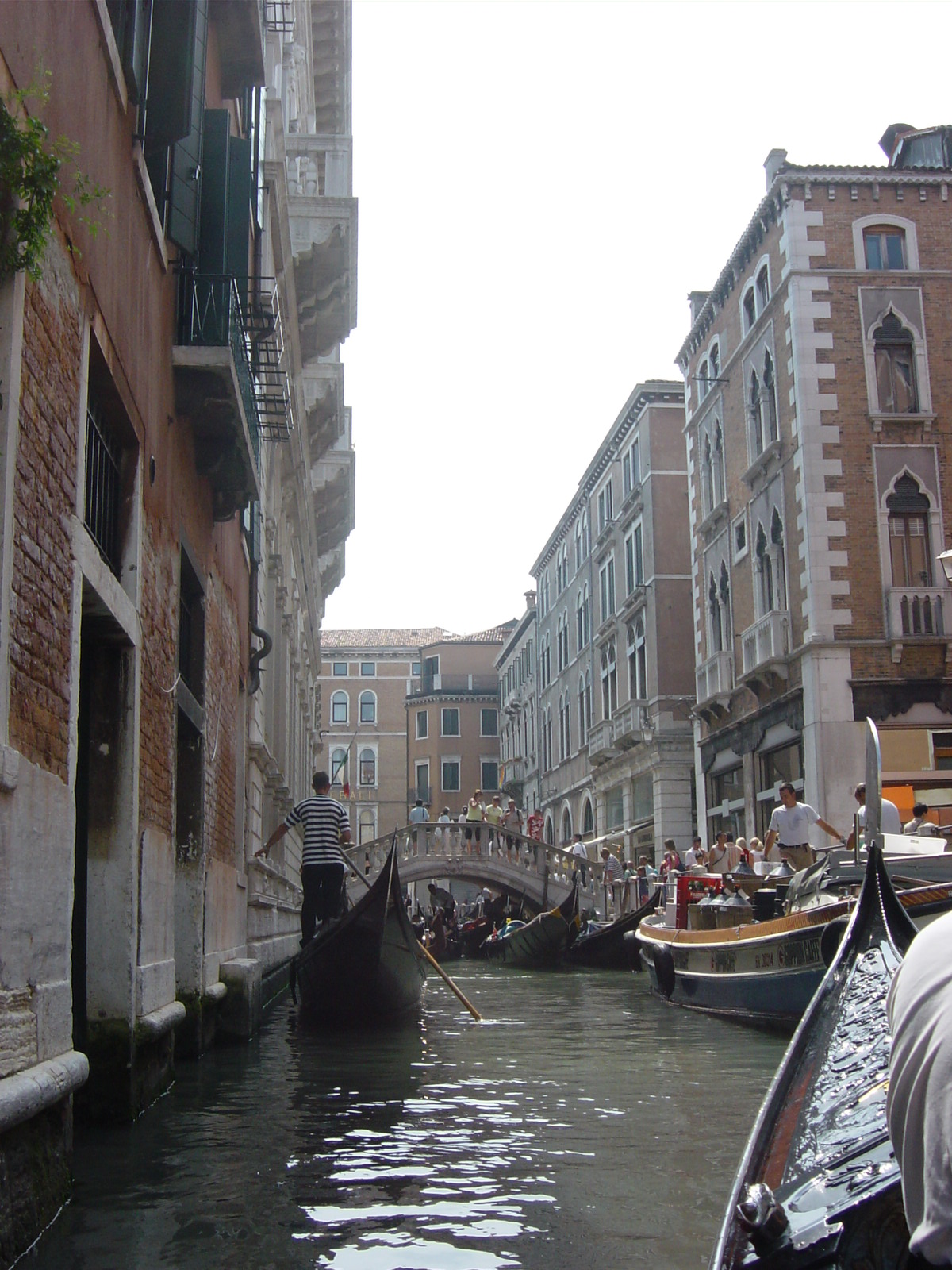 威尼斯市内的运河及运河上著名的小船“贡多拉”（gondola）。